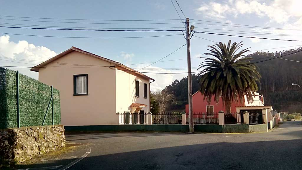 Vista de Bustelo, Ferrol.